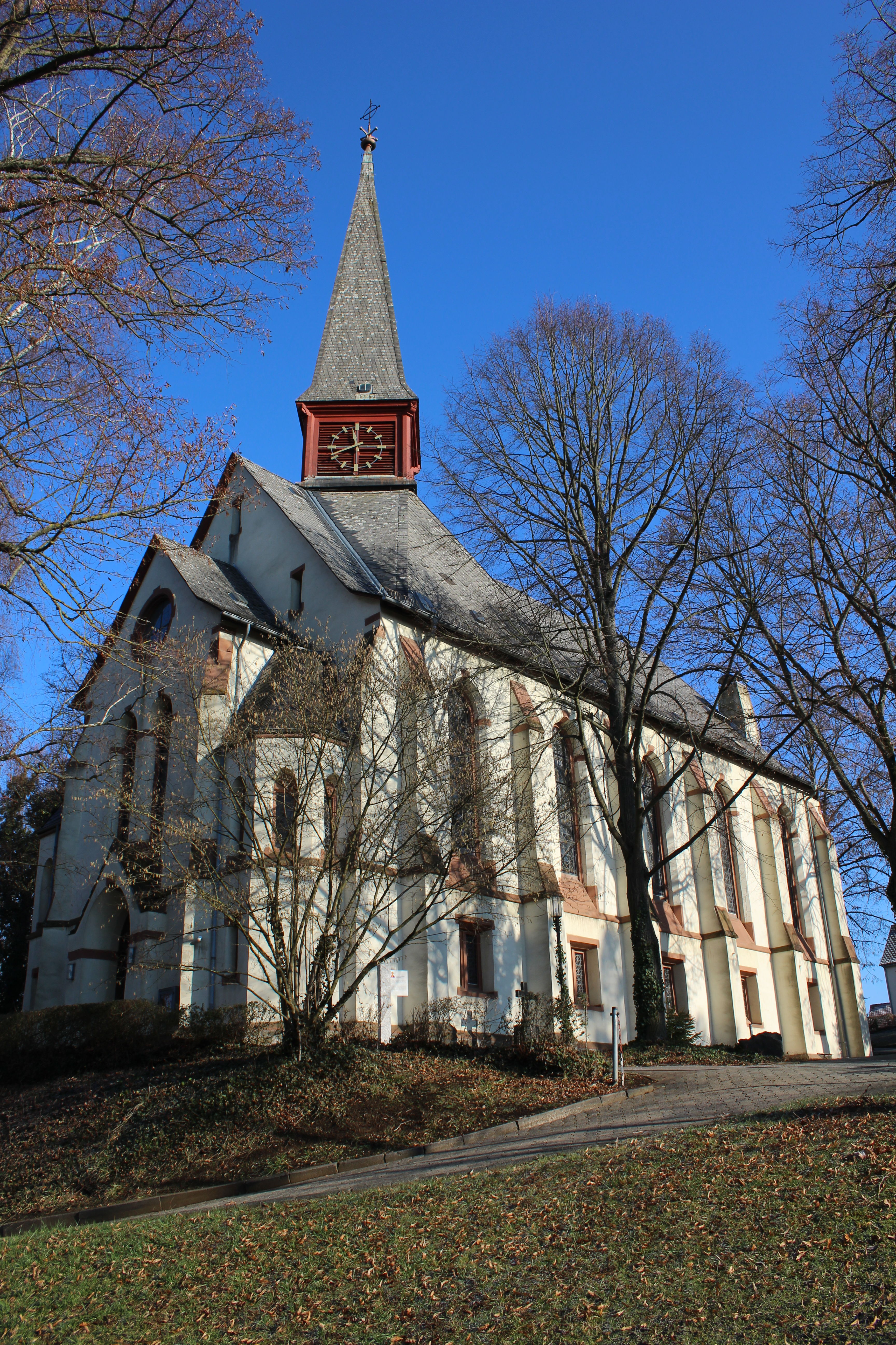 Evangelische Kirche Burgsolms, Gemeinde Solms, Lahn-Dill-Kreis, Hessen, Deutschland